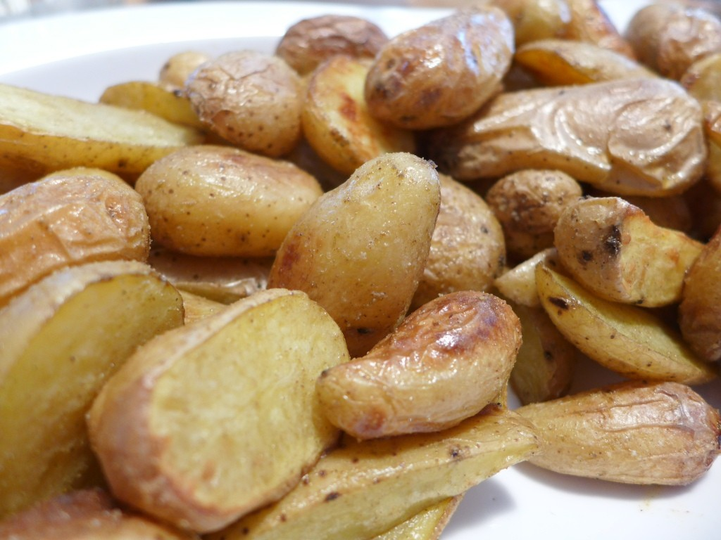 potato wedges / Kartoffelspalten aus dem Backofen